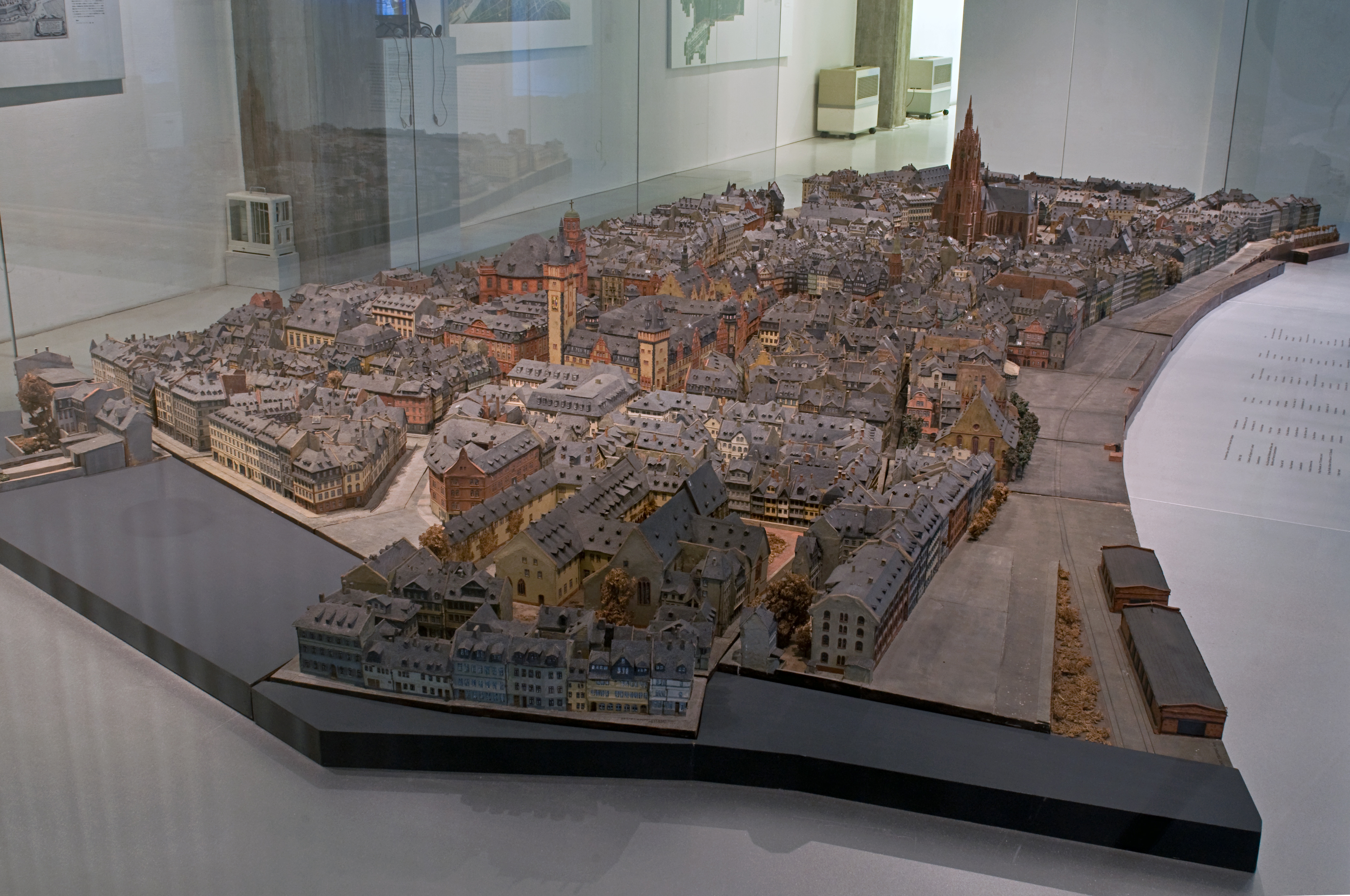 Historisches Museum Frankfurt am Main Altstadtmodell der Brüder Treuner Gesamtsicht von Westen